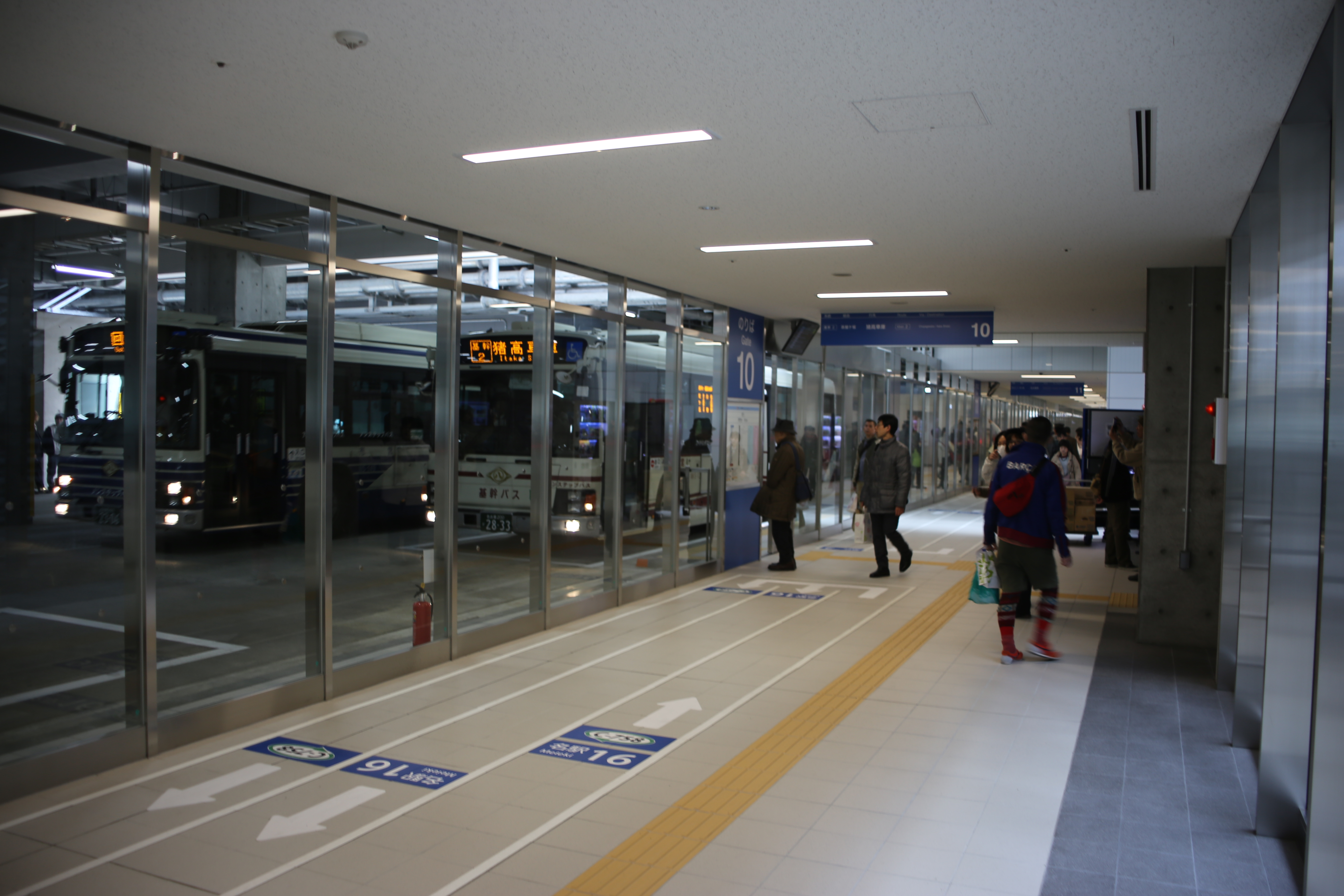 名古屋市中村区名駅の名古屋駅バスターミナル10番のりば付近